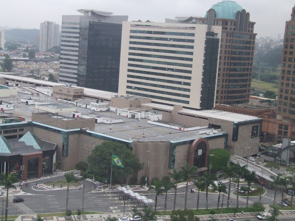 Morumbi Shopping